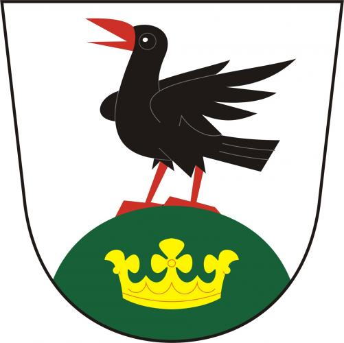 Znak, Hraběšice, okres Šumperk